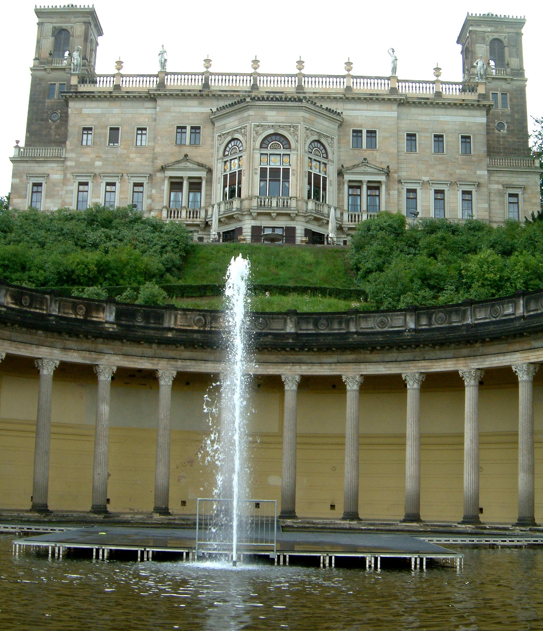 Dresden-Loschwitzhang-Schloss-Albrechtsberg004